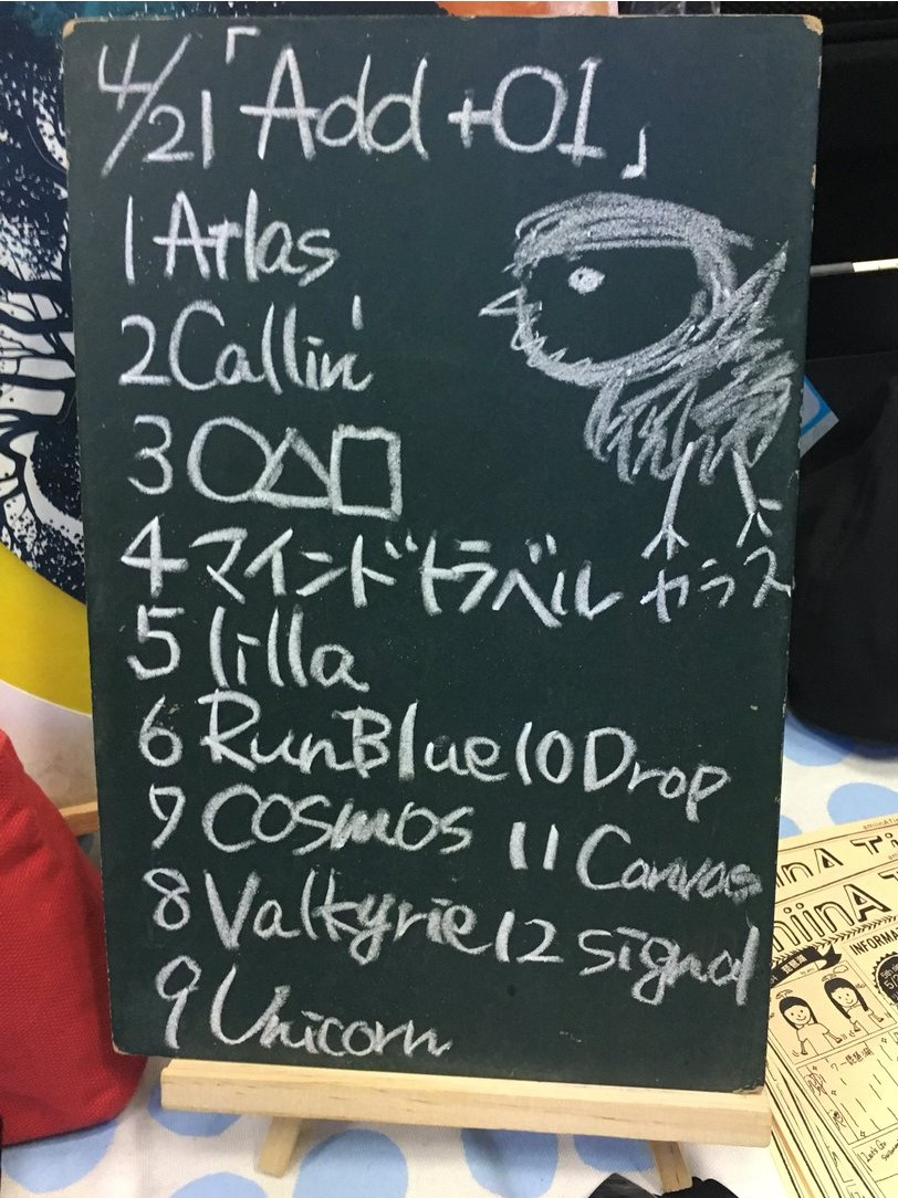 amiinAセトリボード(20180421(1))